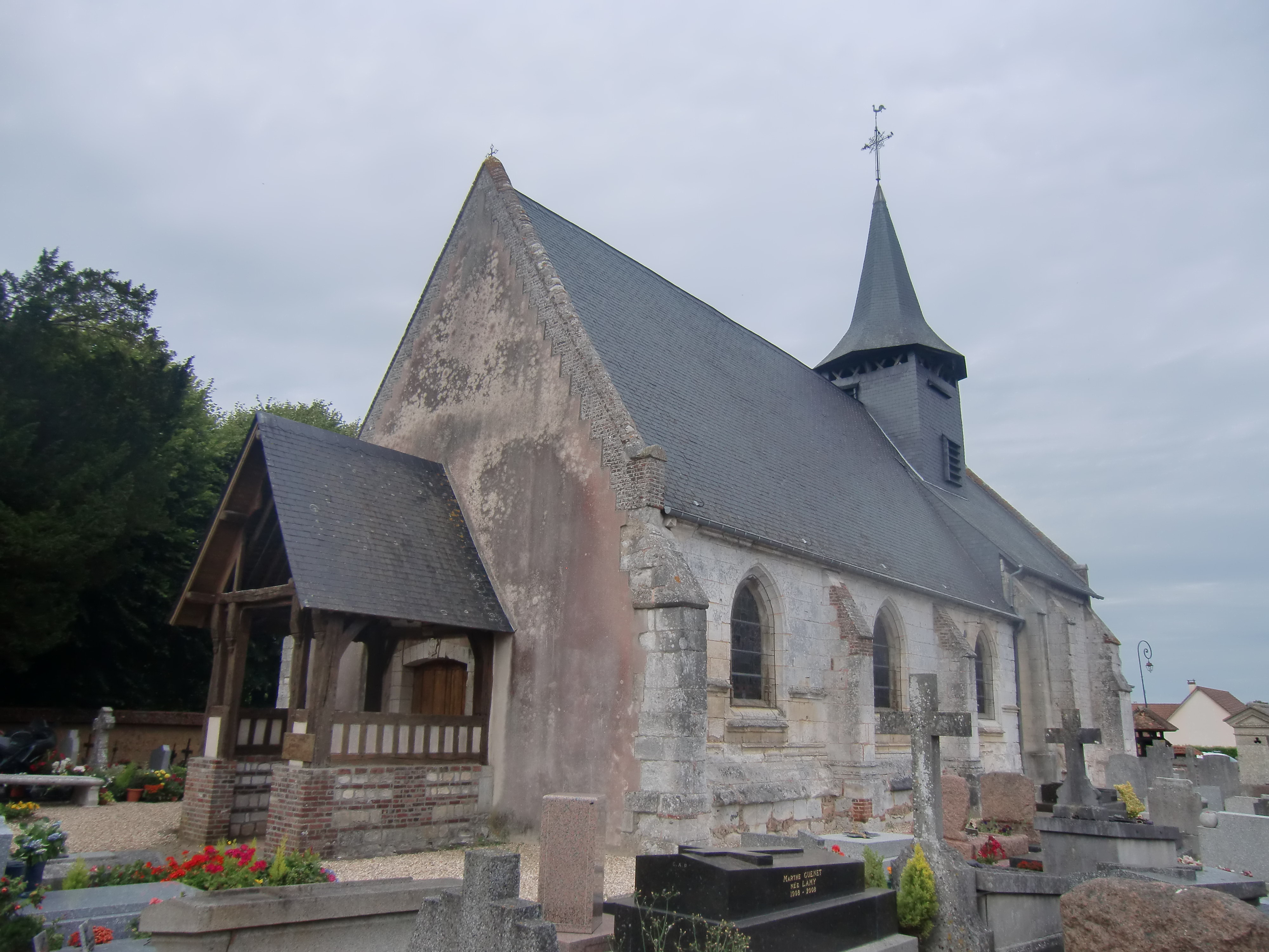 Église Saint-Paer de Berville-en-Roumois (Eure, Normandie, France)